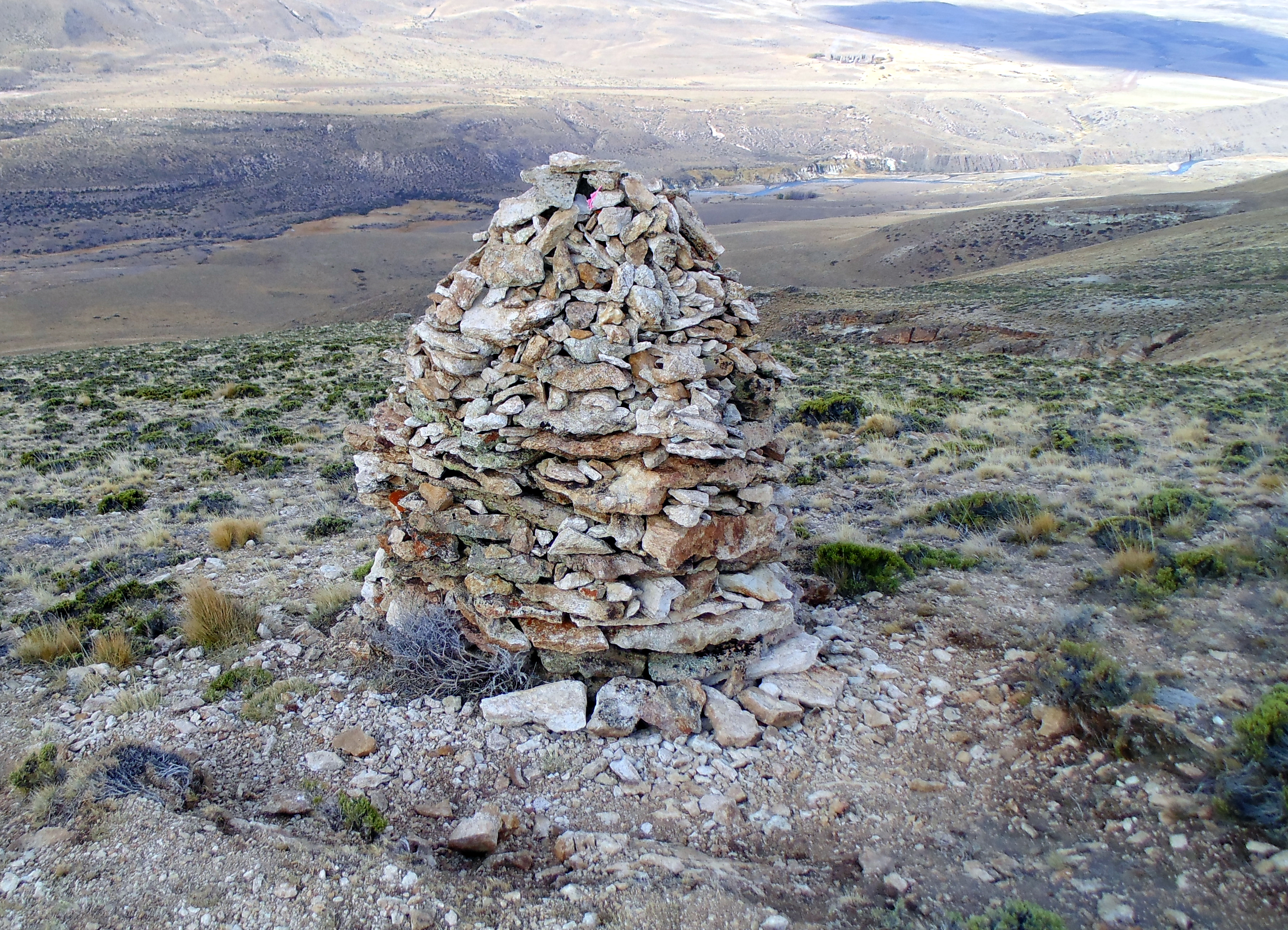 Piedras amontonadas cerca de la Cueva de las Manos delrío Pedregoso, en la Reserva Nacional Lago Jeinimeni, región de Aysén, Chile.